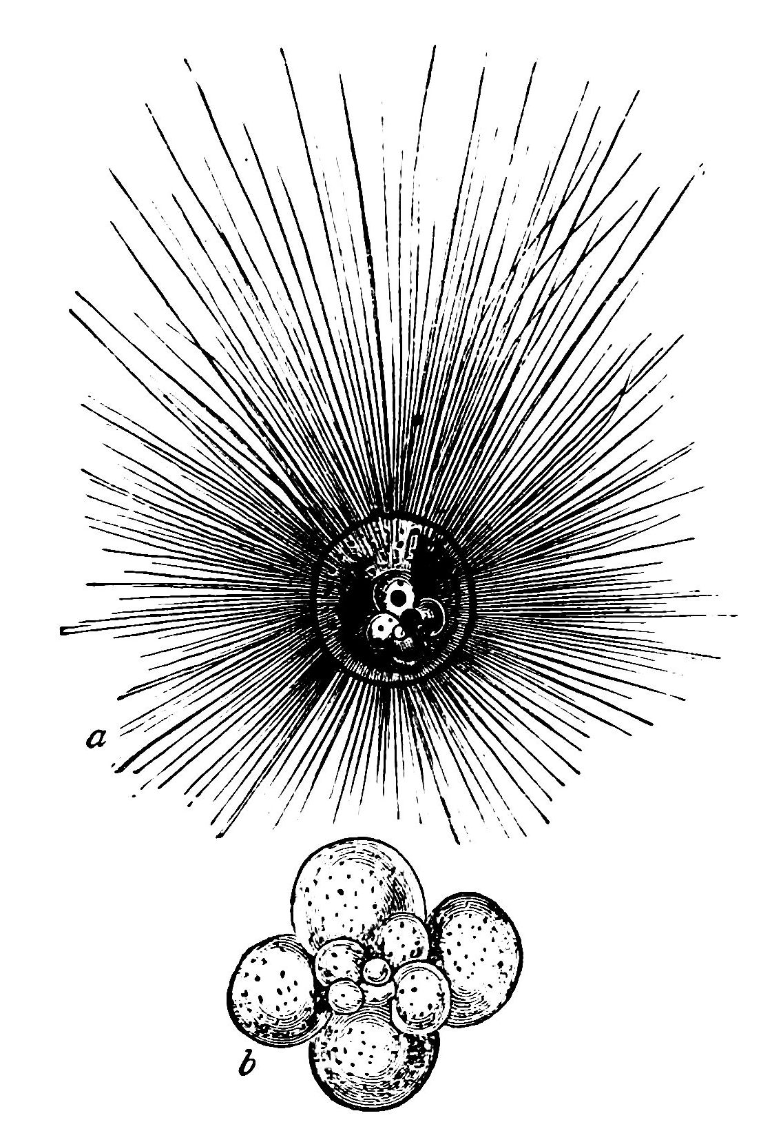 Globigerina etc.